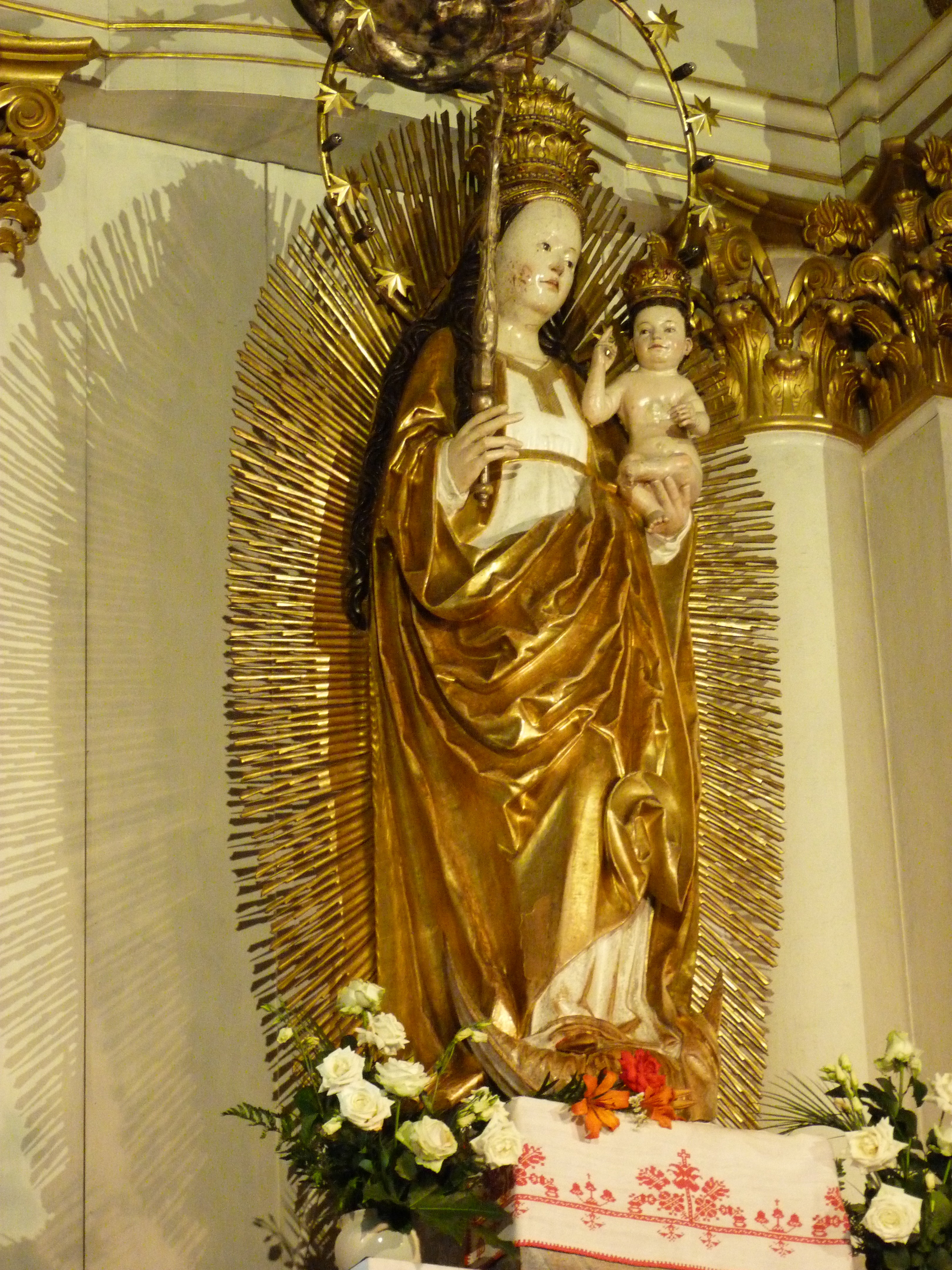 A felvétel 2013. Június 19 –én készült Csíksomlyón (Csíkszereda). Boldogasszony. Csíksomlyói Kegytemplom. ©© Derzsi Elekes Andor, Budapest, 2013, You are authorised to use this photo under Creative Commons – even for commercial, for profit purposes. The photo must be attributed to Derzsi Elekes Andor. All of the photos and vids in the Metapolisz DVD line are under Creative Commons and can be used even for commercial – for profit – purposes. Recommended Citation Derzsi Elekes Andor: Metapolisz DVD line Time: mashine time + 1 hour.